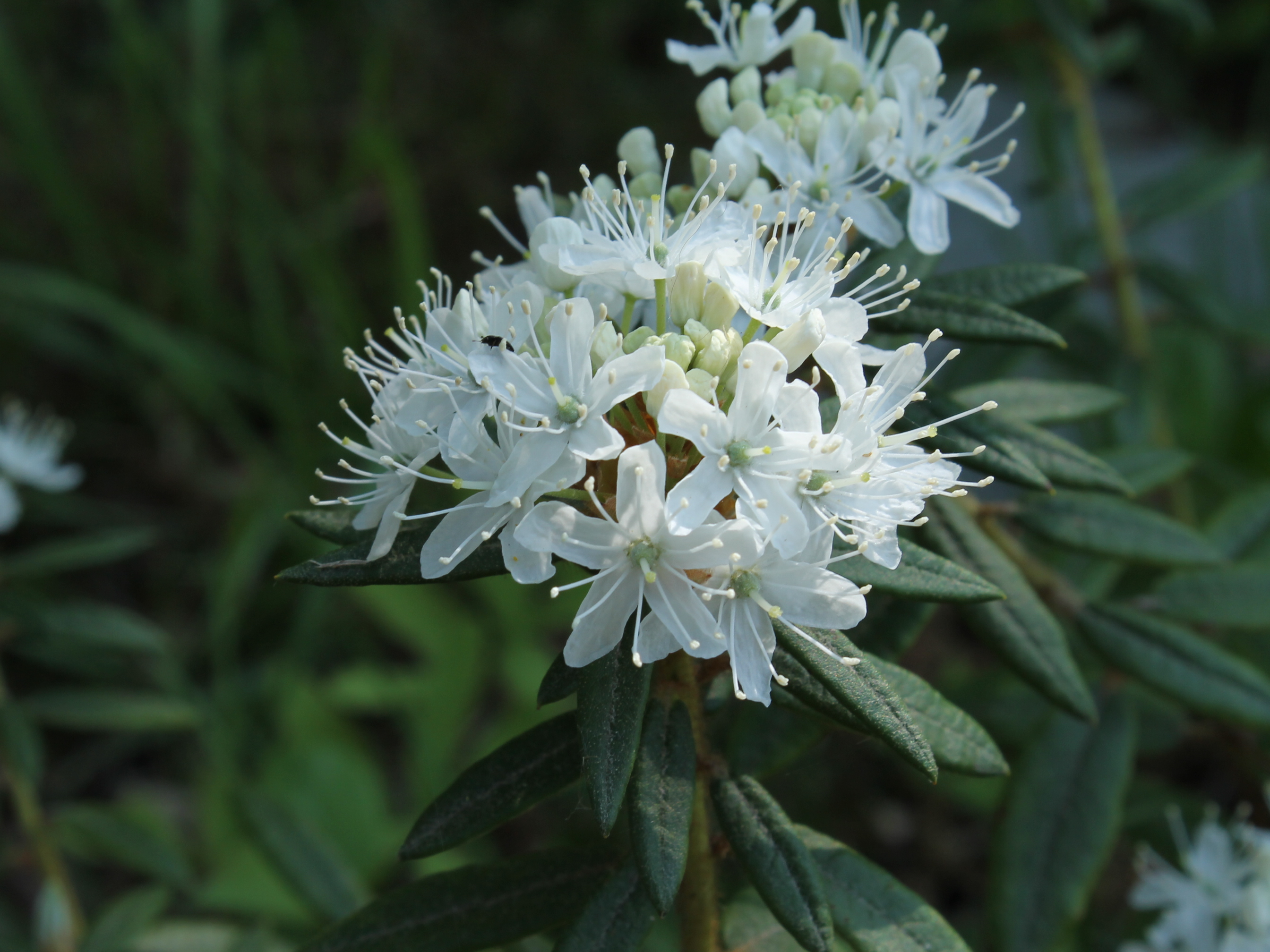 Rhododendron tomentosum, Gymnázium Brno-Řečkovice